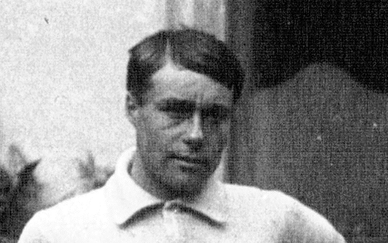 VIIe Olympiades à Anvers : l'équipe française gagnant la course sur route des 170 km : Canteloube : [photographie de presse] / Agence Meurisse.